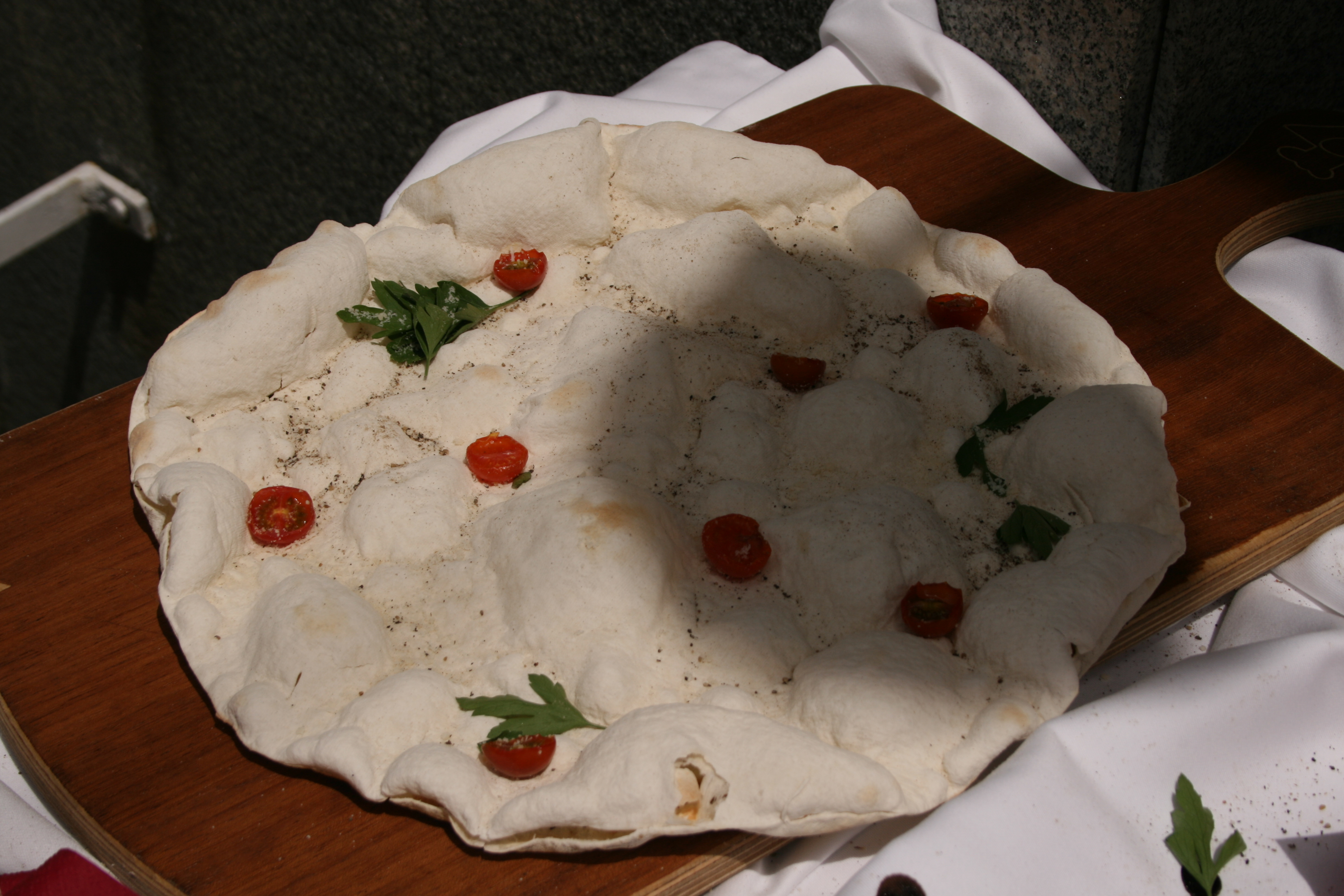 Focaccia (Salamanca)